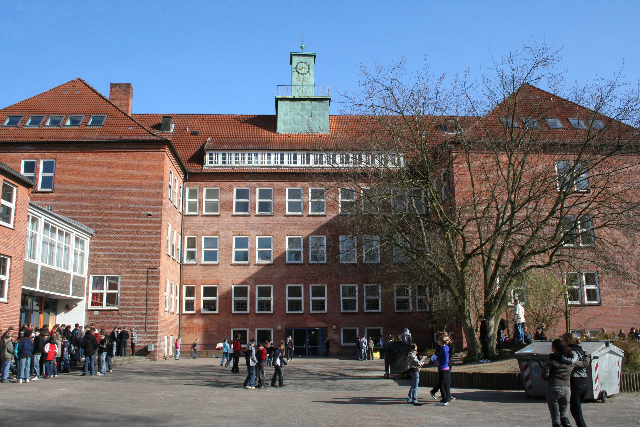 Außenansicht des Gymnasiums Wellingdorf